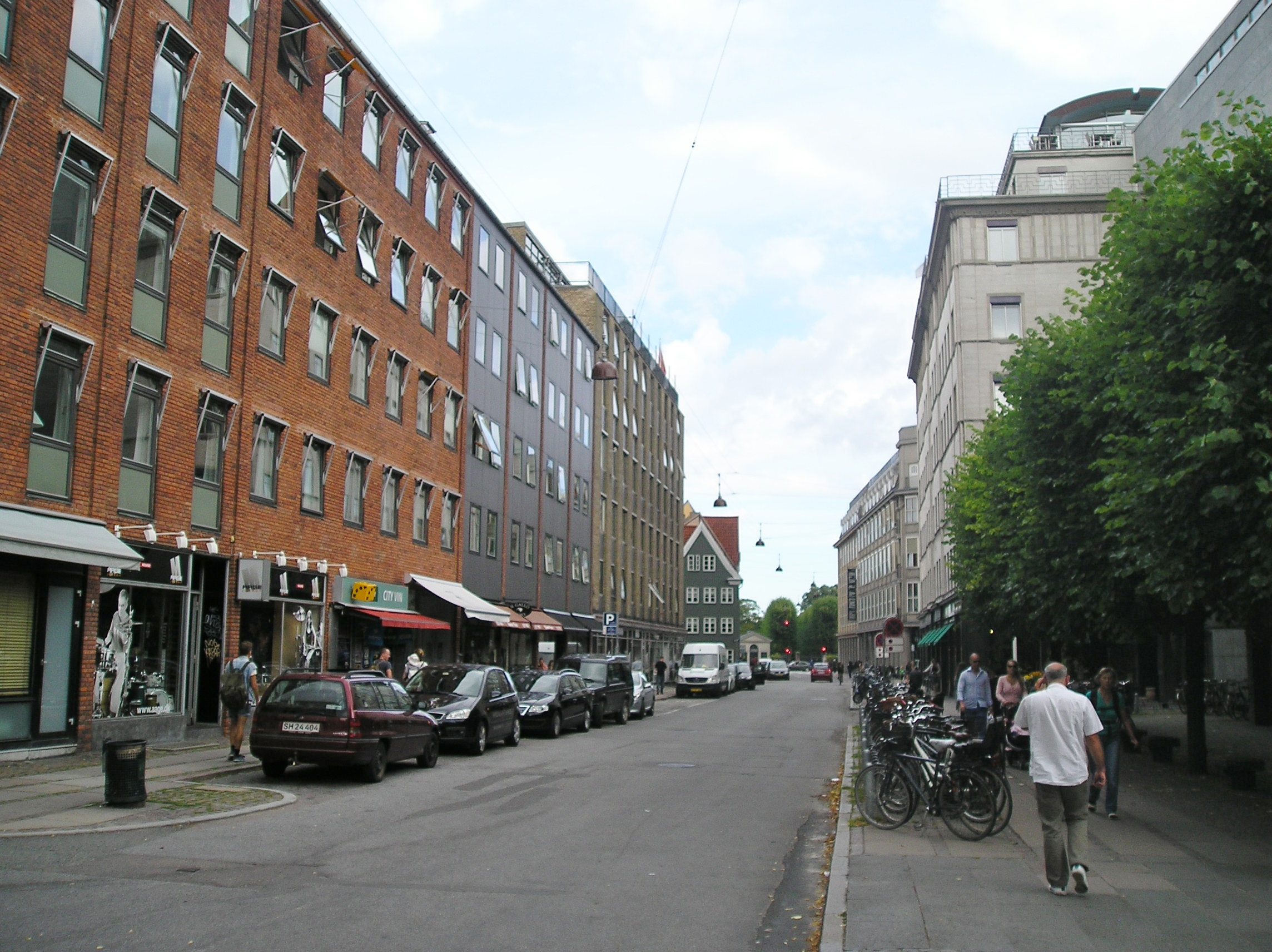 The street Landemærket in Copenhagen.